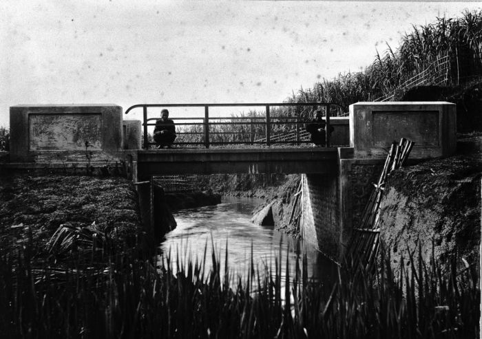 Foto. Brug met betongewelven over de rivier de Pekadja, de brug is gebouwd door de suikeronderneming; grens tussen de ondernemingen Poerwokerto en Soekaradja, Midden-Java